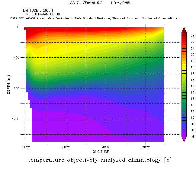 Vertikalschnitt der Temperatur von der Oberfläche bis 1500 m Tiefe im Nordatlantik auf 30°N.